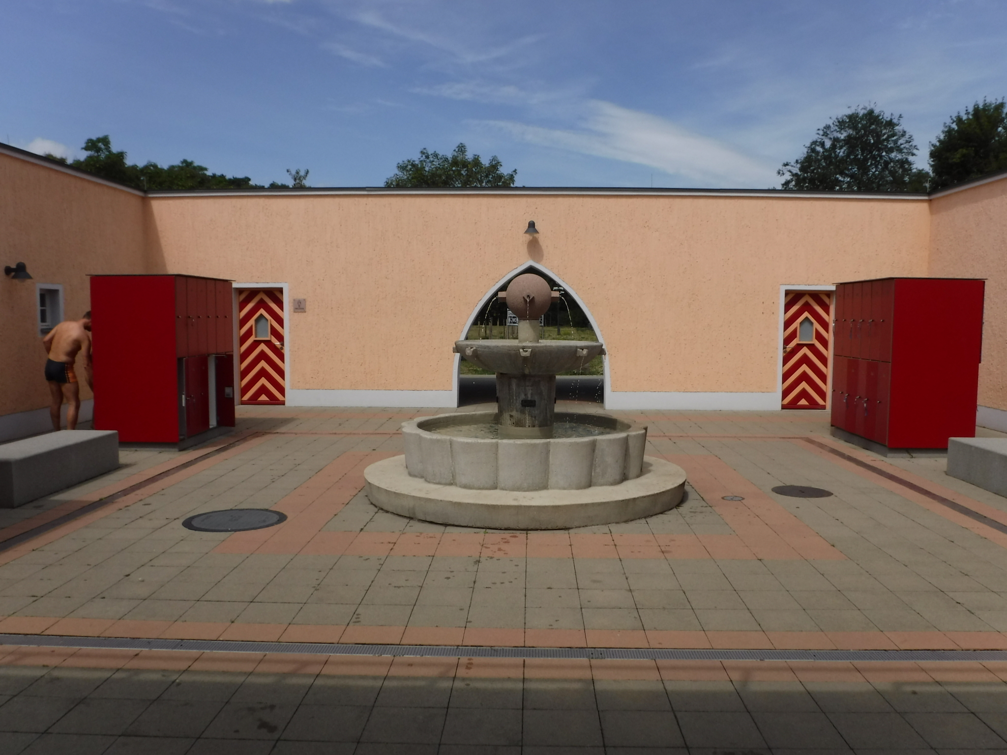 Atrium im Innenhof der Umkleidekabinen im Georg-Arnhold-Bad. Einer der wenigen erhaltenen Bauten aus der Erbauungszeit. Brunnen saniert.